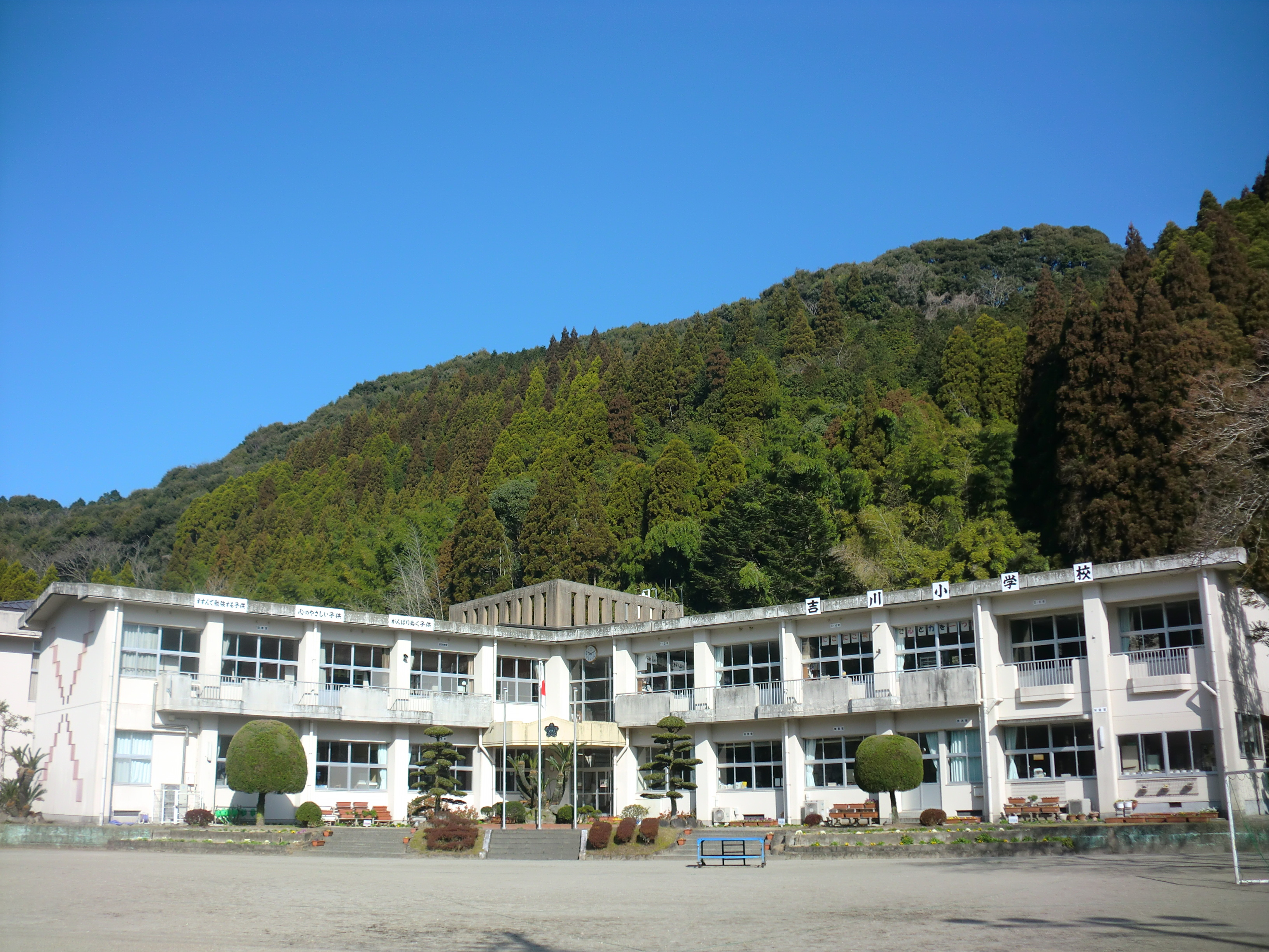 薩摩川内市にある薩摩川内市立吉川（きちかわ）小学校